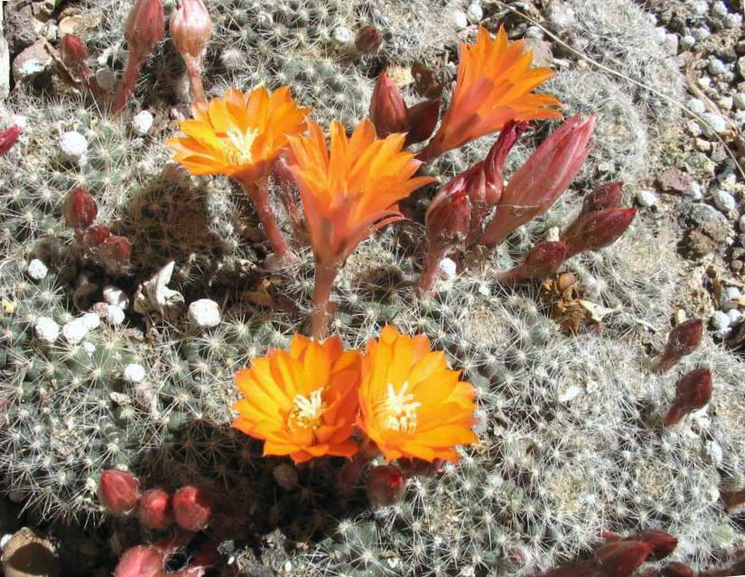 Rebutia fiebrigii (Rebutia flavistyla), in free culture in Jardin Botanique de Monaco.